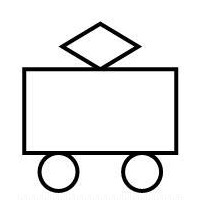 Symbol nach IEC 60417-5219